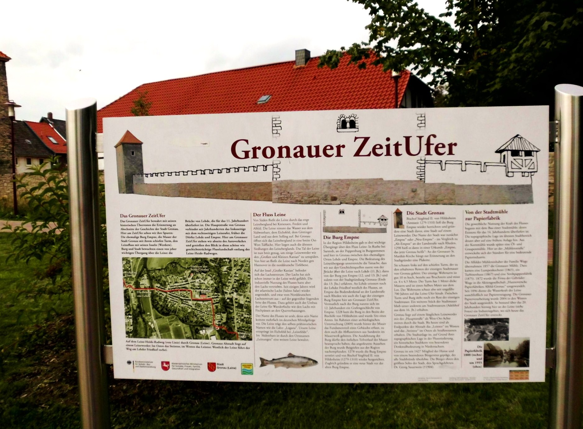 Am Leine-Wehr